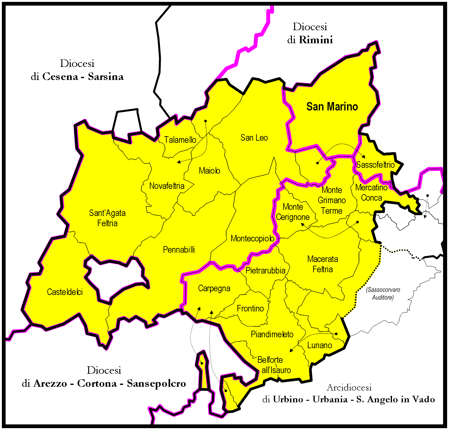 Mappa della Diocesi di San Marino Montefeltro